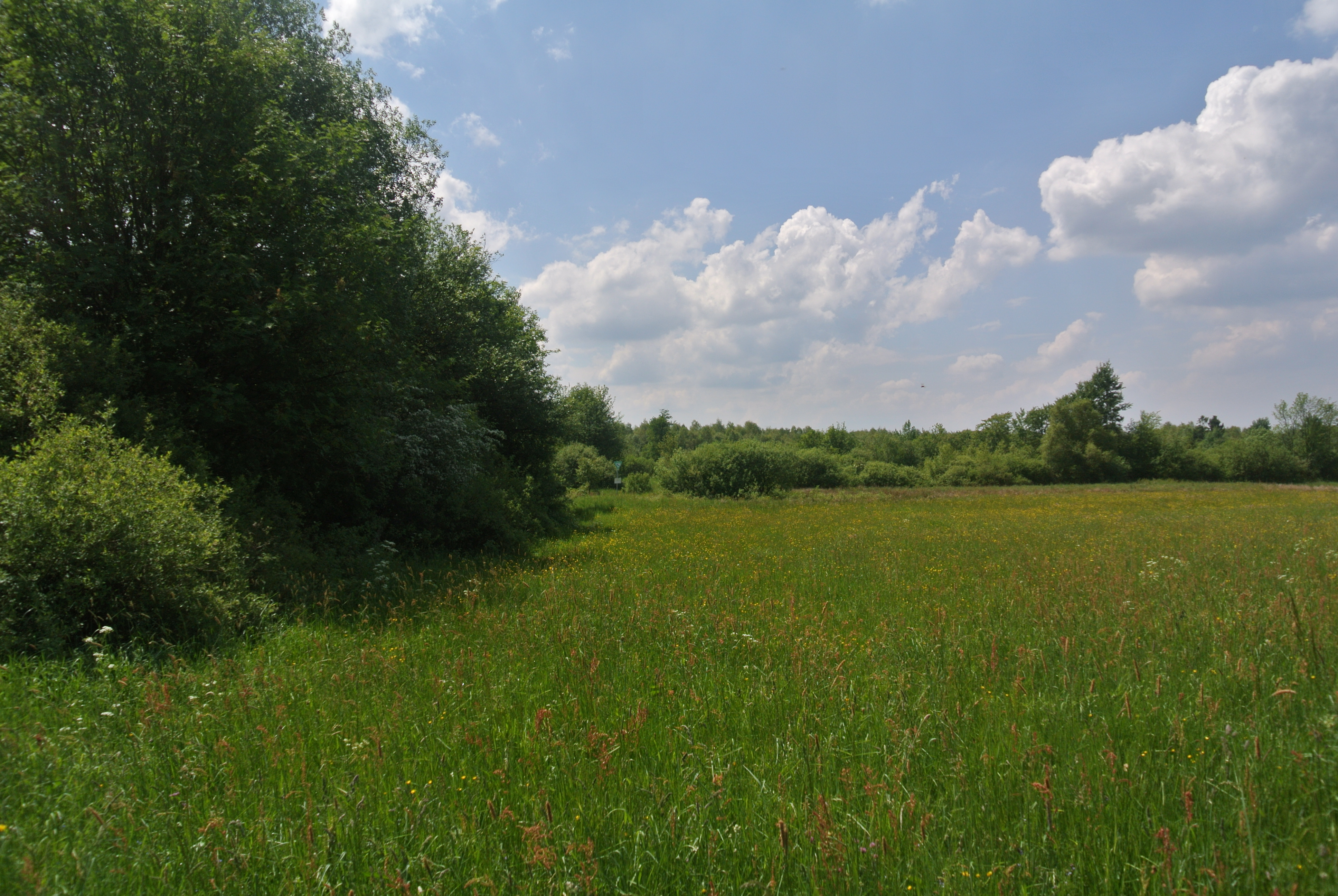 NSG Wollerscheider Venn, Städteregion Aachen, SImmerath